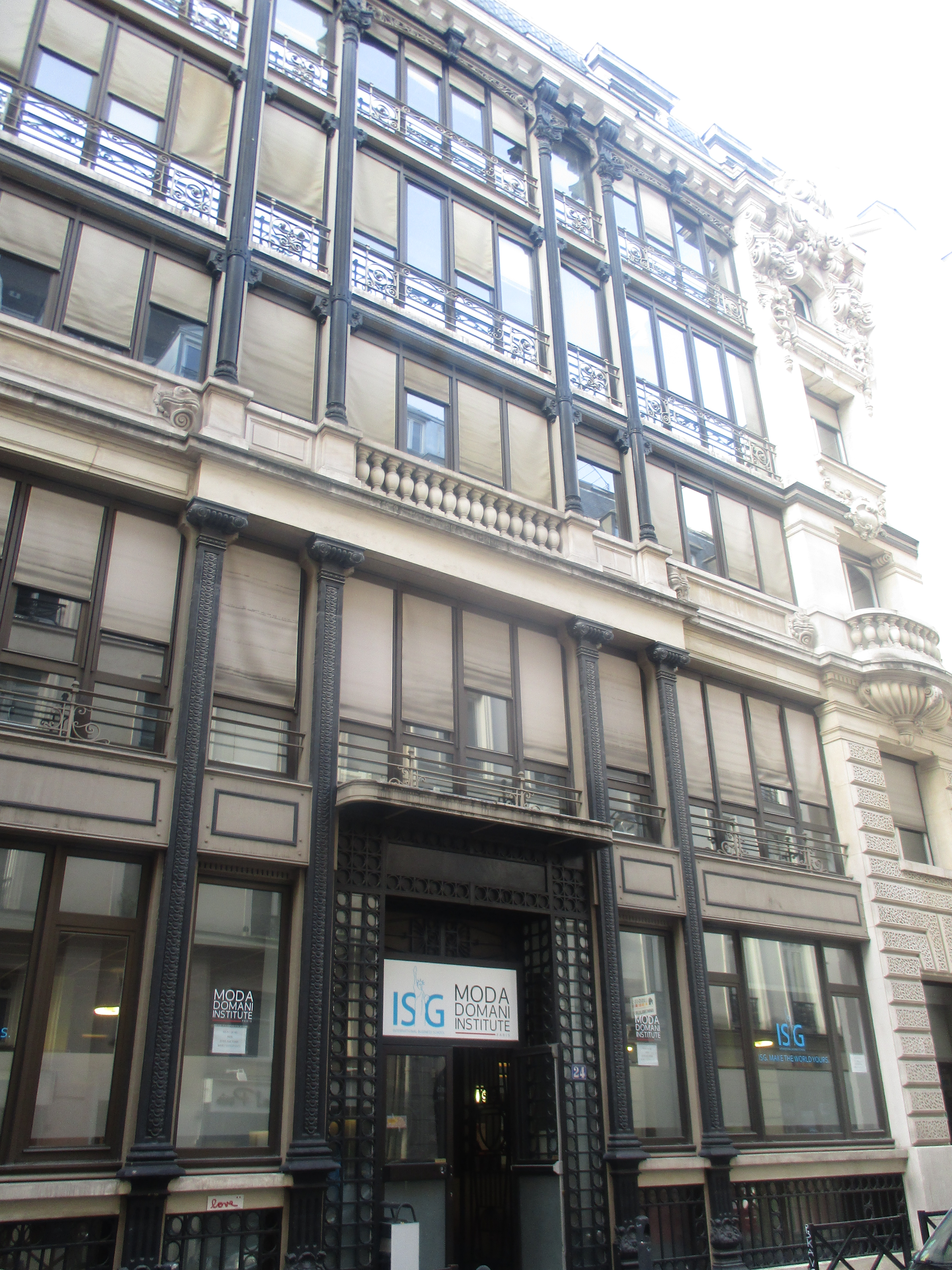 24 rue Saint-Marc, Paris IIe. Moda Domani Institute.